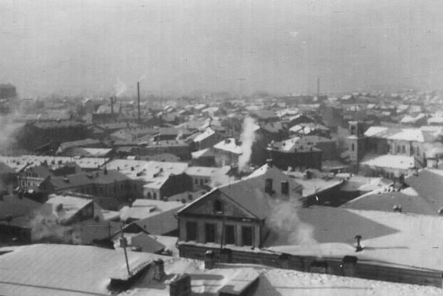 Беларуская (тарашкевіца): Менск (Miensk). Забудова паміж вуліцамі Койданаўскай (vulica Kojdanaŭskaja) і Нямігай (vulica Niamiha)